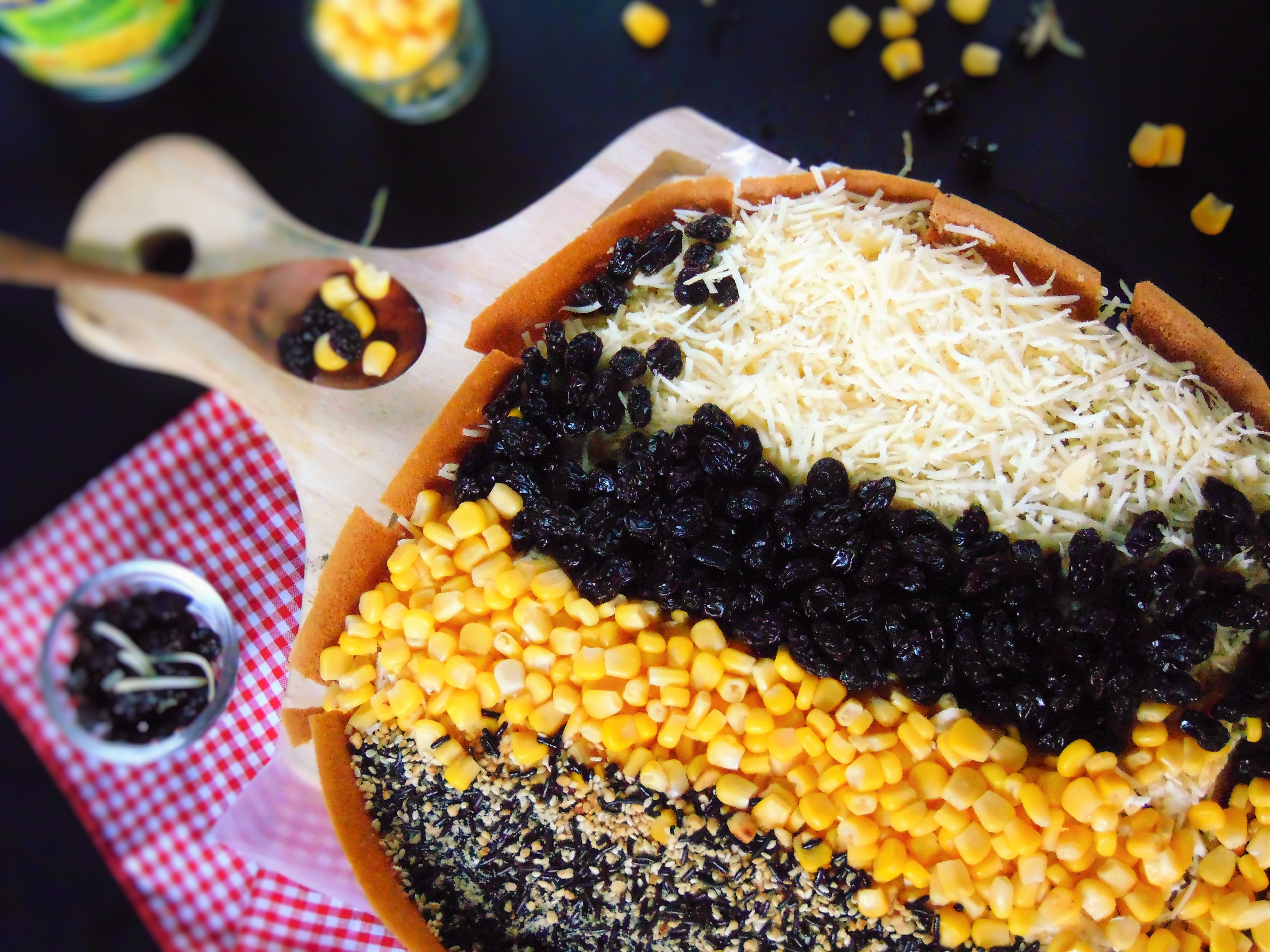 Martabak Pizza memiliki tampilan jauh lebih menarik dibandingkan dengan martabak manis konvensional